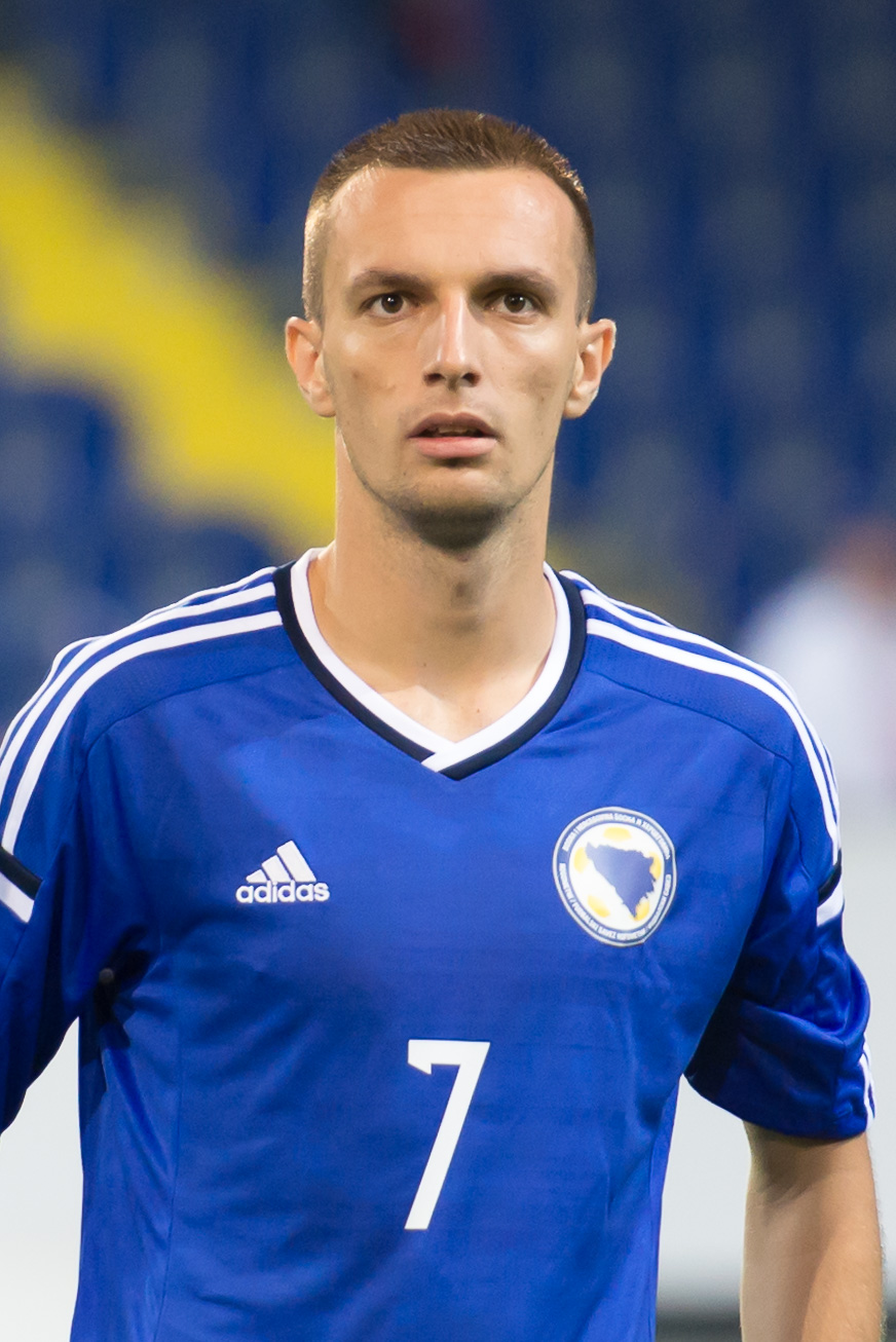 Fußball U21 EM-Qualifikation Österreich gegen Bosnien und Herzegowina St. Pölten, 5. September 2014 Jasmin Mešanović